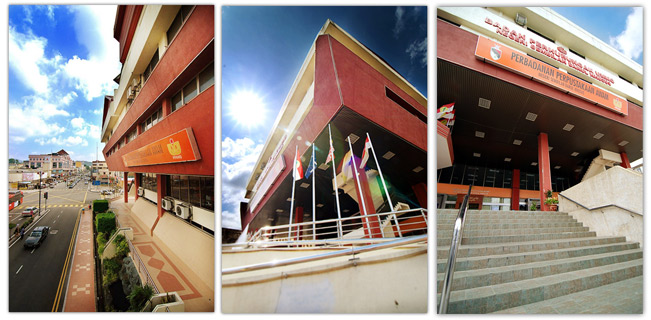 ppans